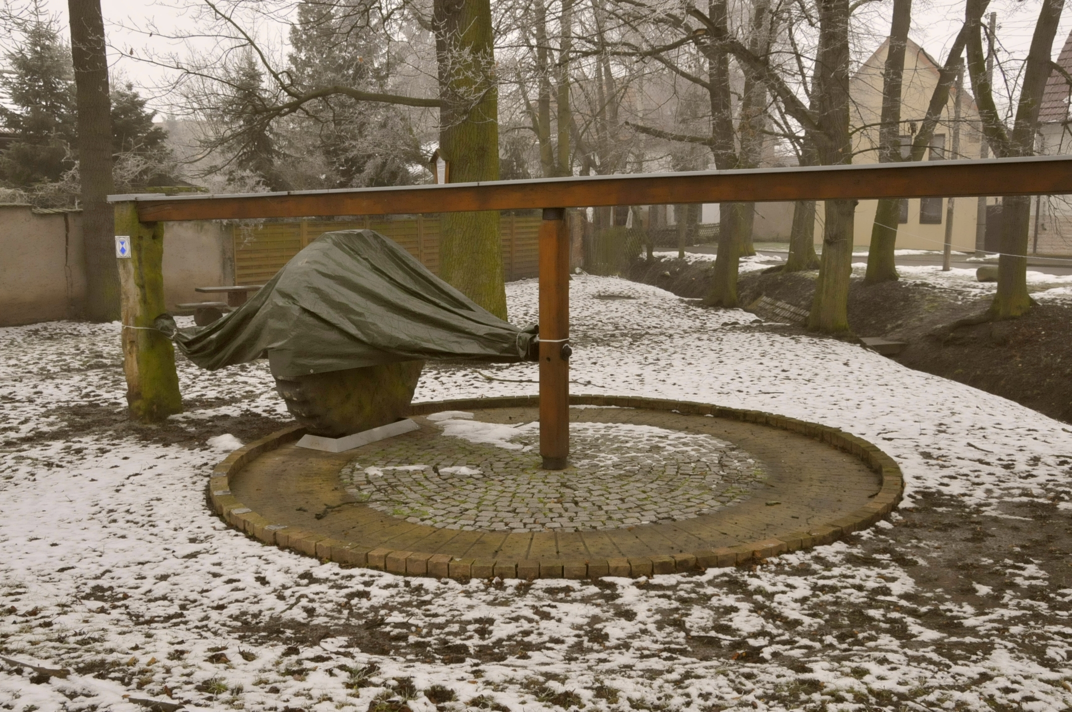 Rohrborn, Waidmühle